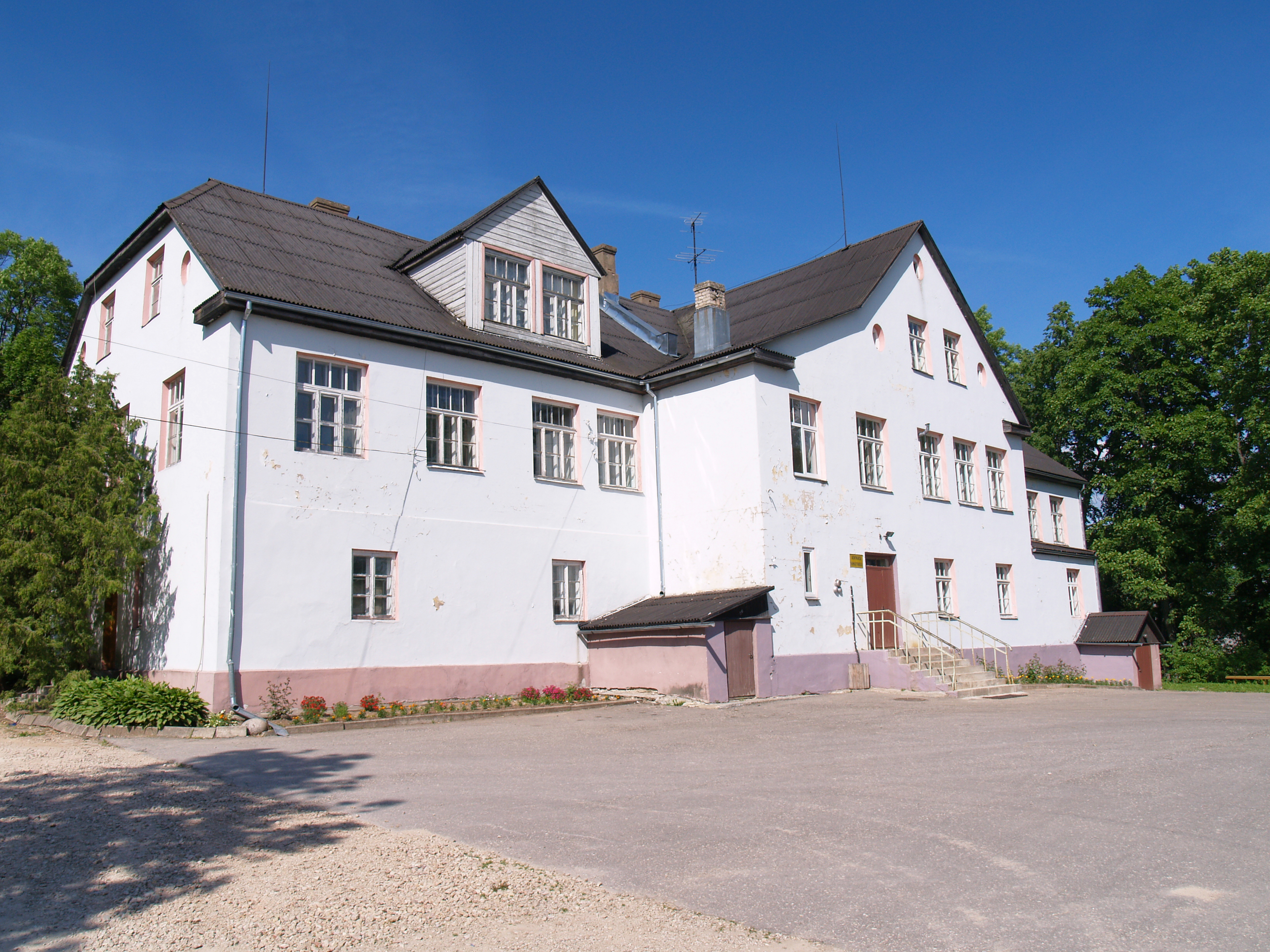 Annas pamatskola (Anna primary school)